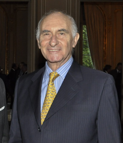 El Embajador Mamet junto al ex presidente Fernando de la Rúa.